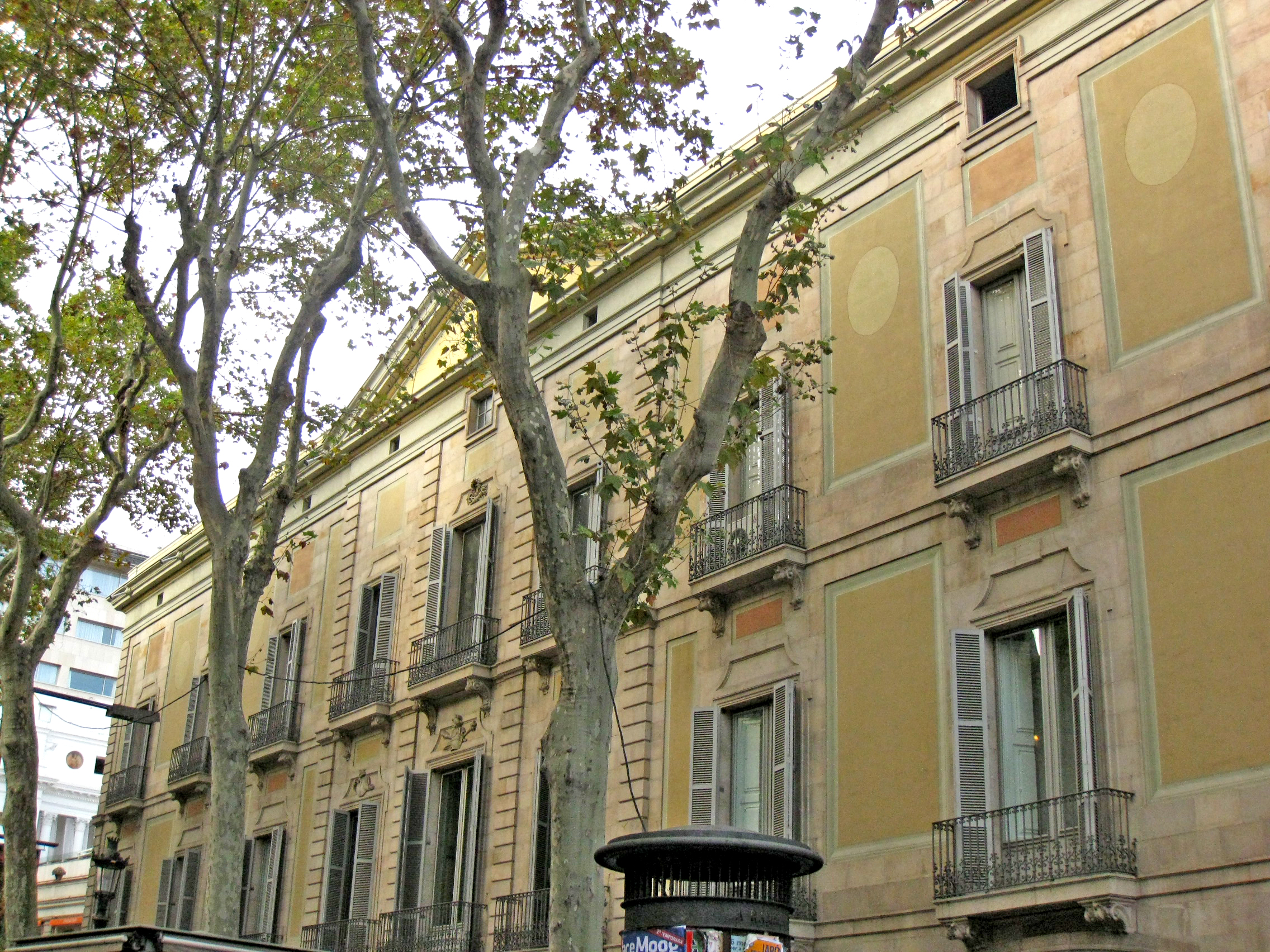 Palau Moja, edifici neoclàssic del segle XVIII, situat a la Rambla de Barcelona, a la cantonada amb el carrer de la Portaferrissa. Allotja dependències de la Generalitat de Catalunya, com ara la seu de la Direcció General de Patrimoni i la Llibreria de la Generalitat.